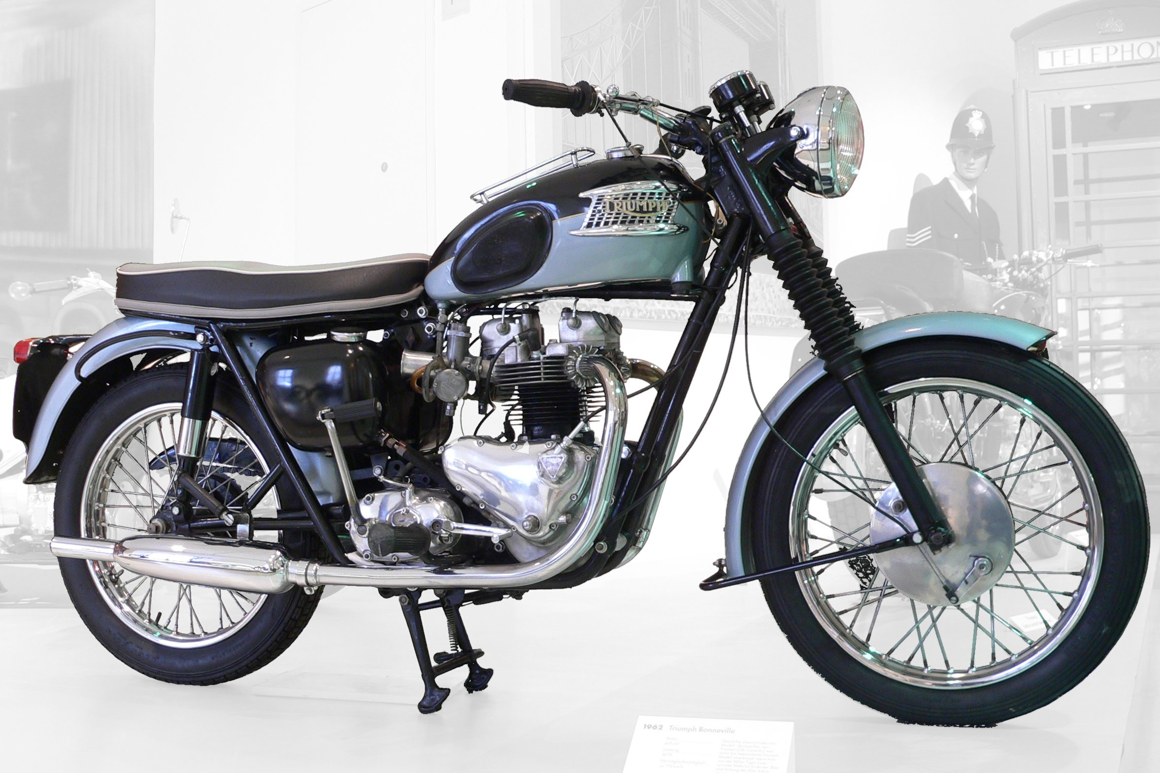 Motorbike Triumph Bonneville T120 (1962) at the Deutsches Zweirad- und NSU-Museum (649 cm³, 46 PS, 170 km/h)